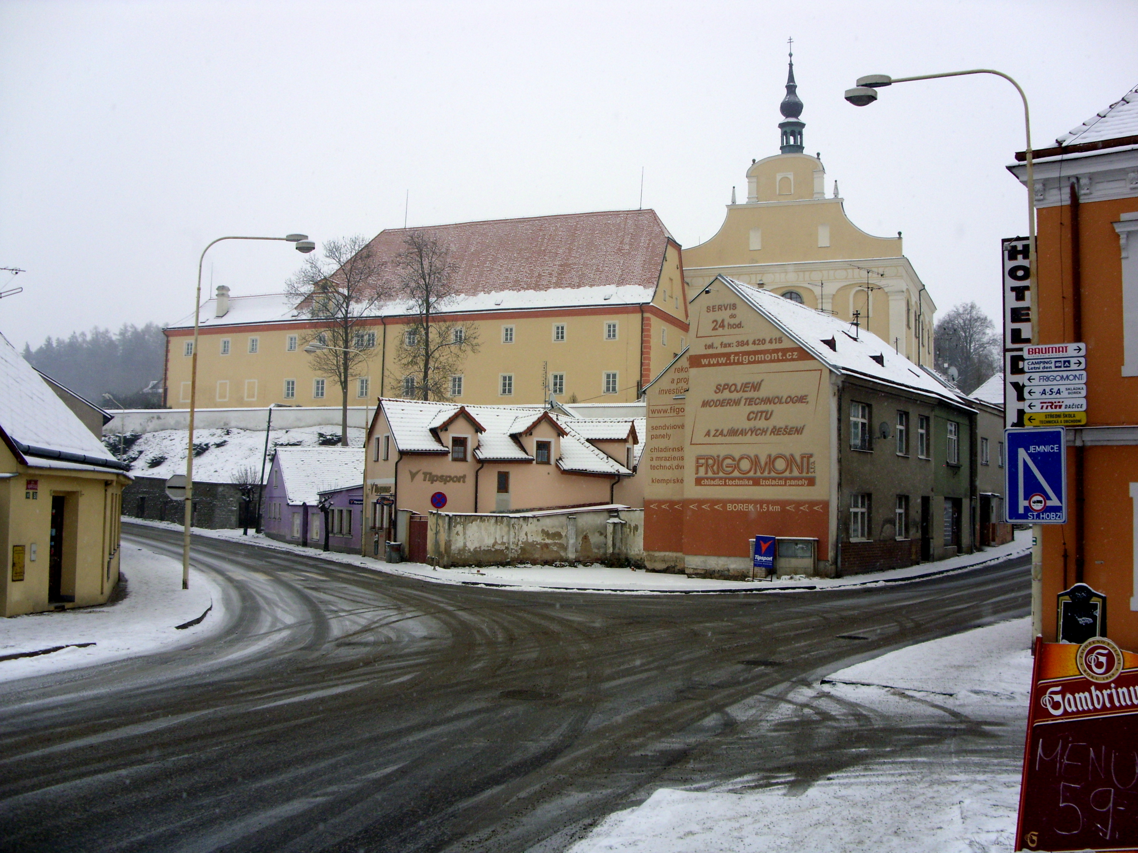 Klášter v Dačicích.